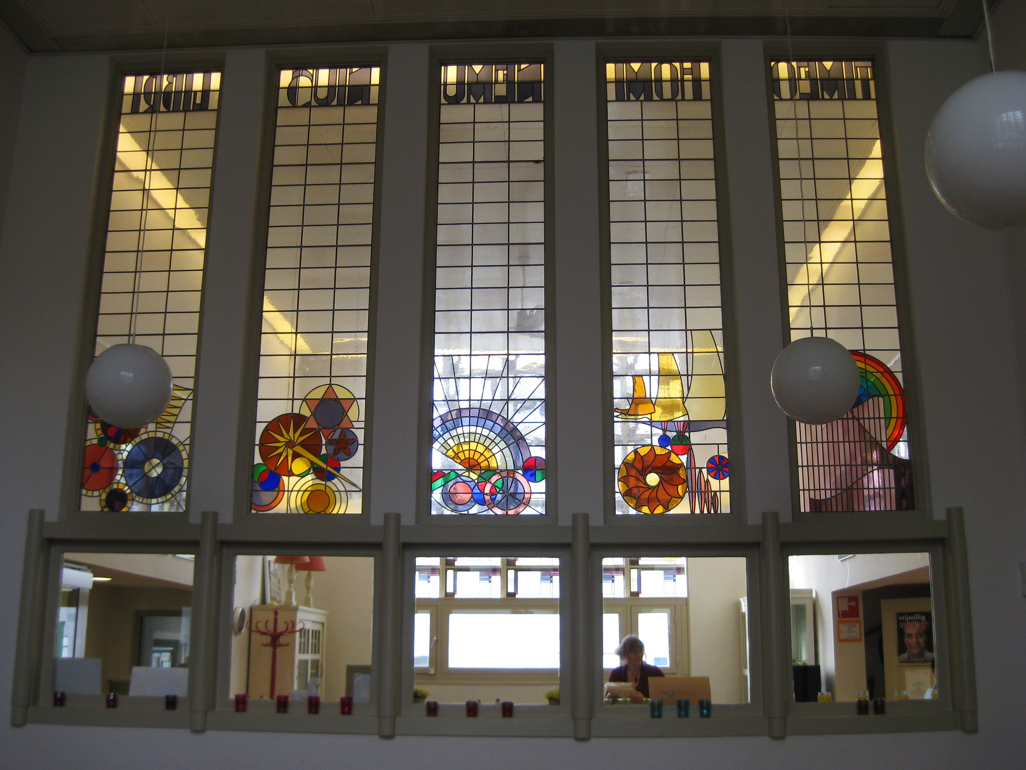 Architect Dick Greiner ontwierp niet alleen het gebouw, ook het hele interieur, zoals de deuren, ramen, kozijnen en letters van bibliotheekgebouw, Brink 43, Amsterdam-Oost